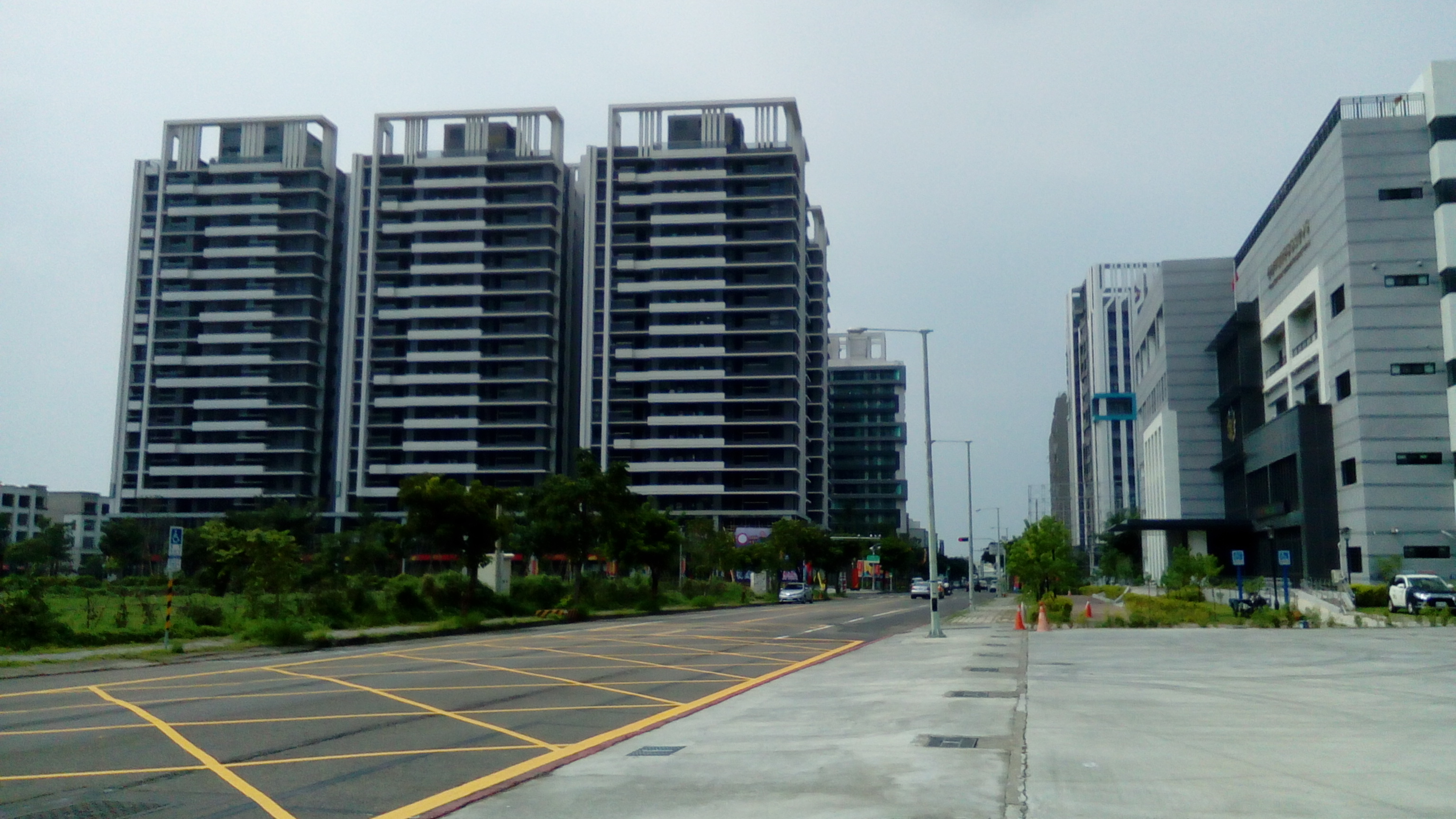 因應台南都會區日後往東擴張而興建的建築群